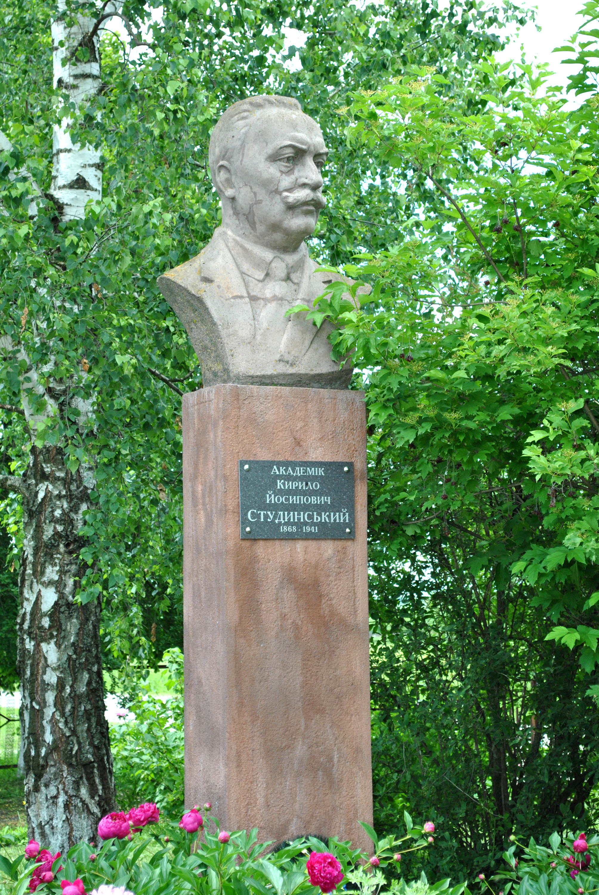 Пам'ятник академіку, мовознавцю, літературознавцю, фольклористу Кирилові Студинському в селі Кип’ячка (біля школи) Тернопільського району Тернопільської області.